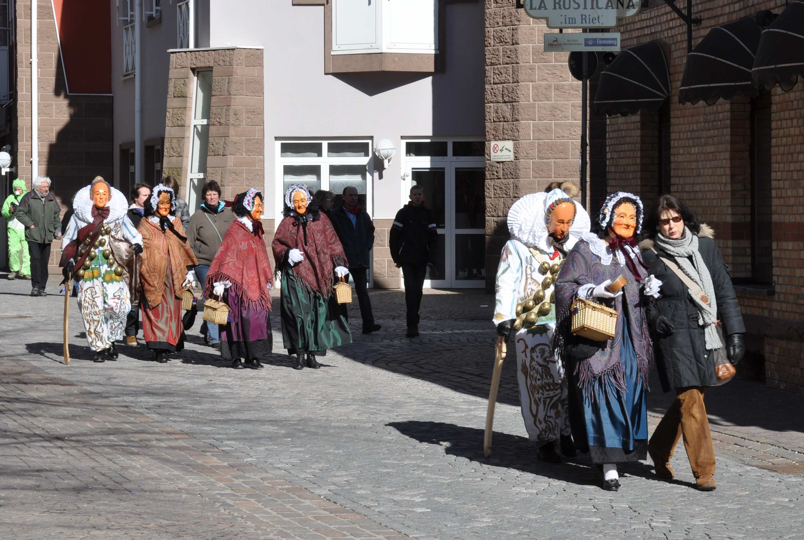 Fasnet in Villingen, Fasnetsmontag 2011 Narren der Narrozunft beim Flanieren durch die Straßen